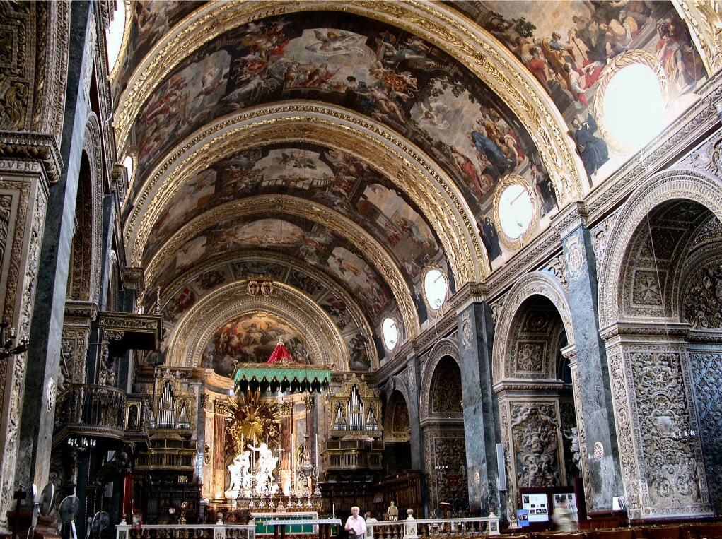 Malta, La Valletta, St. John Cathedral Foto scattata da Stefano Trezzi (Utente:Yoruno) e da me licenziata secondo quanto sotto indicato.